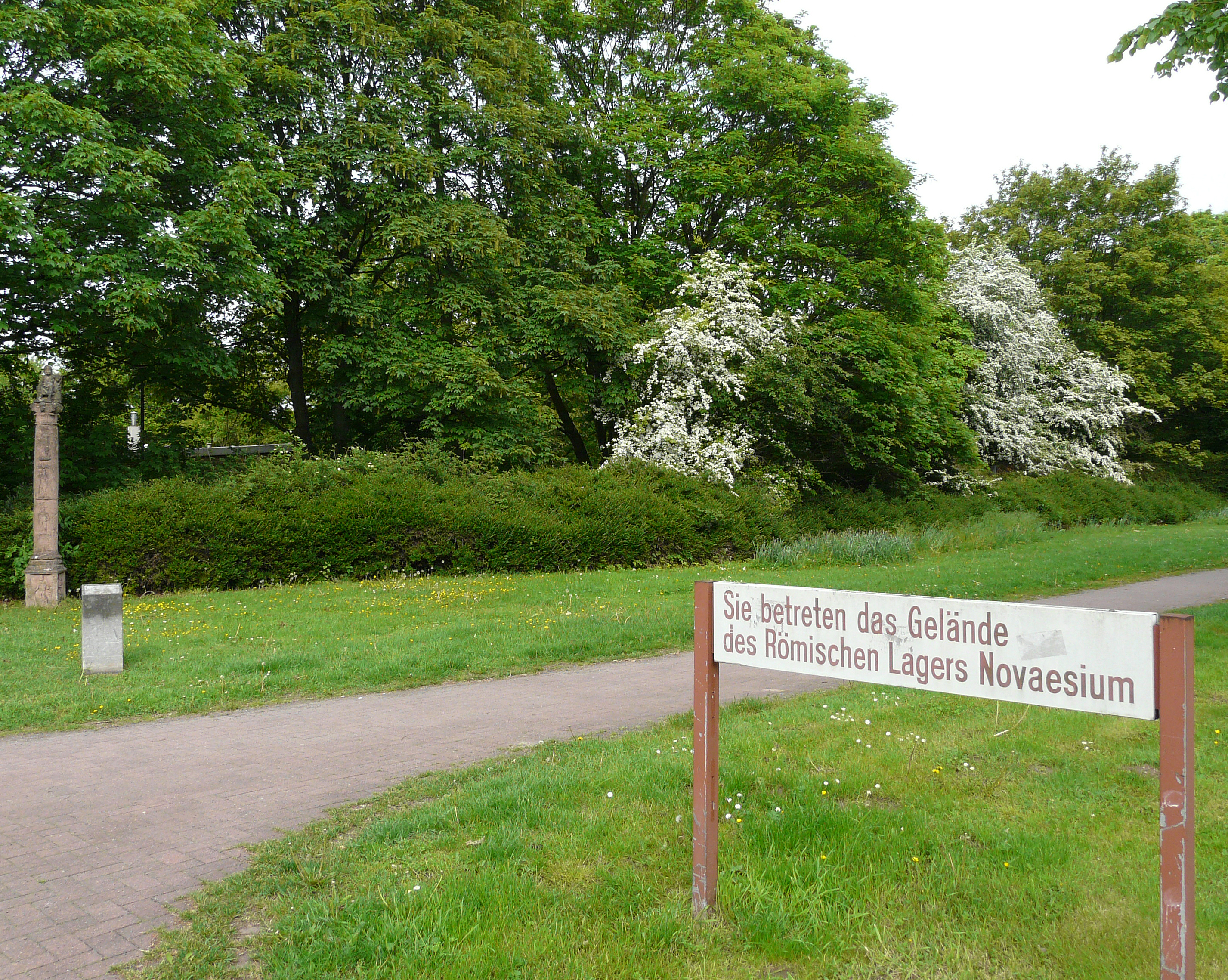 Markierung des ehemaligen römischen Militärlagers von Novaesium; Historischer Rundgang, Neuss